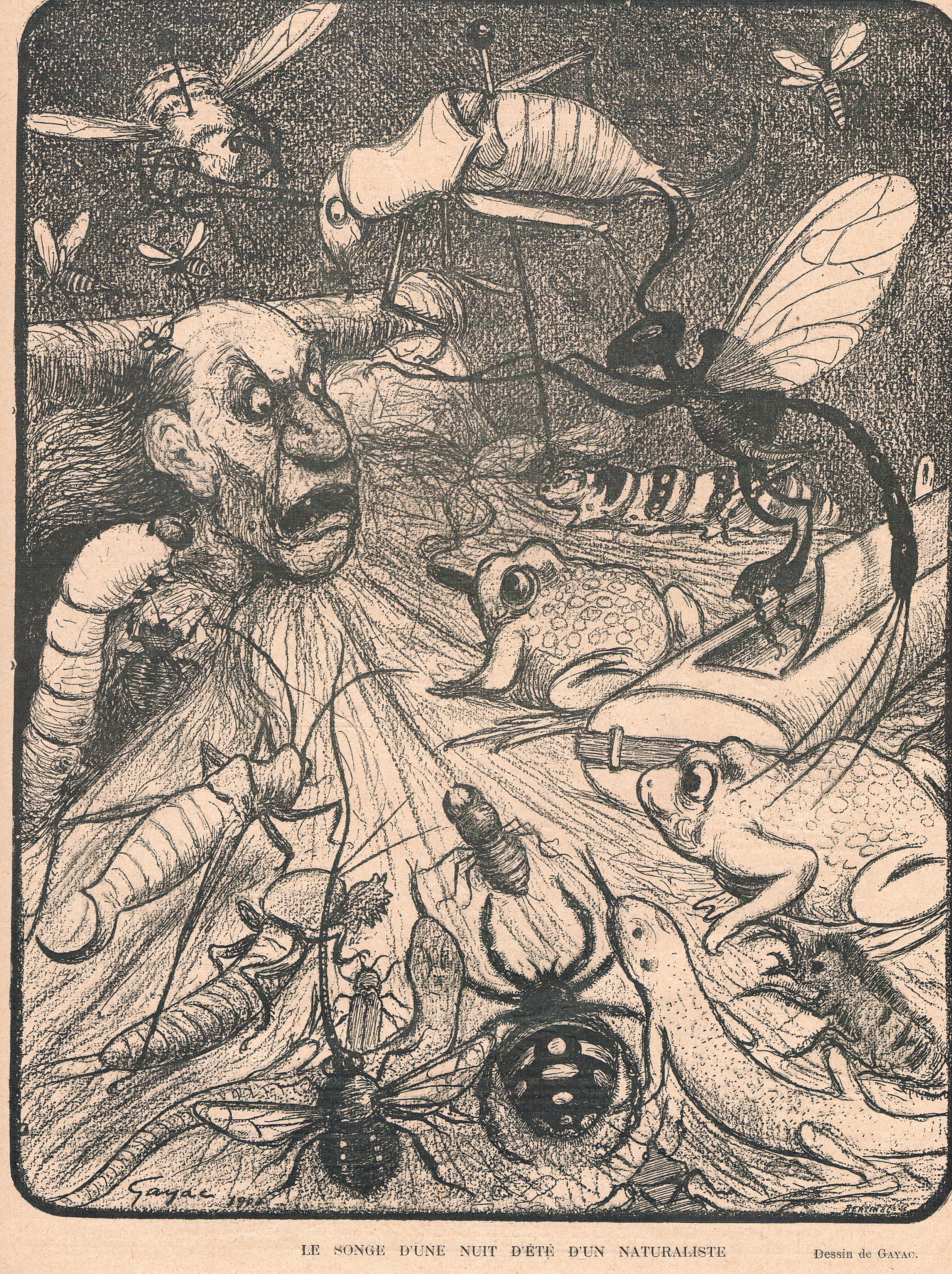 reproduction d'un dessin au crayon, 21 cm x 27 cm